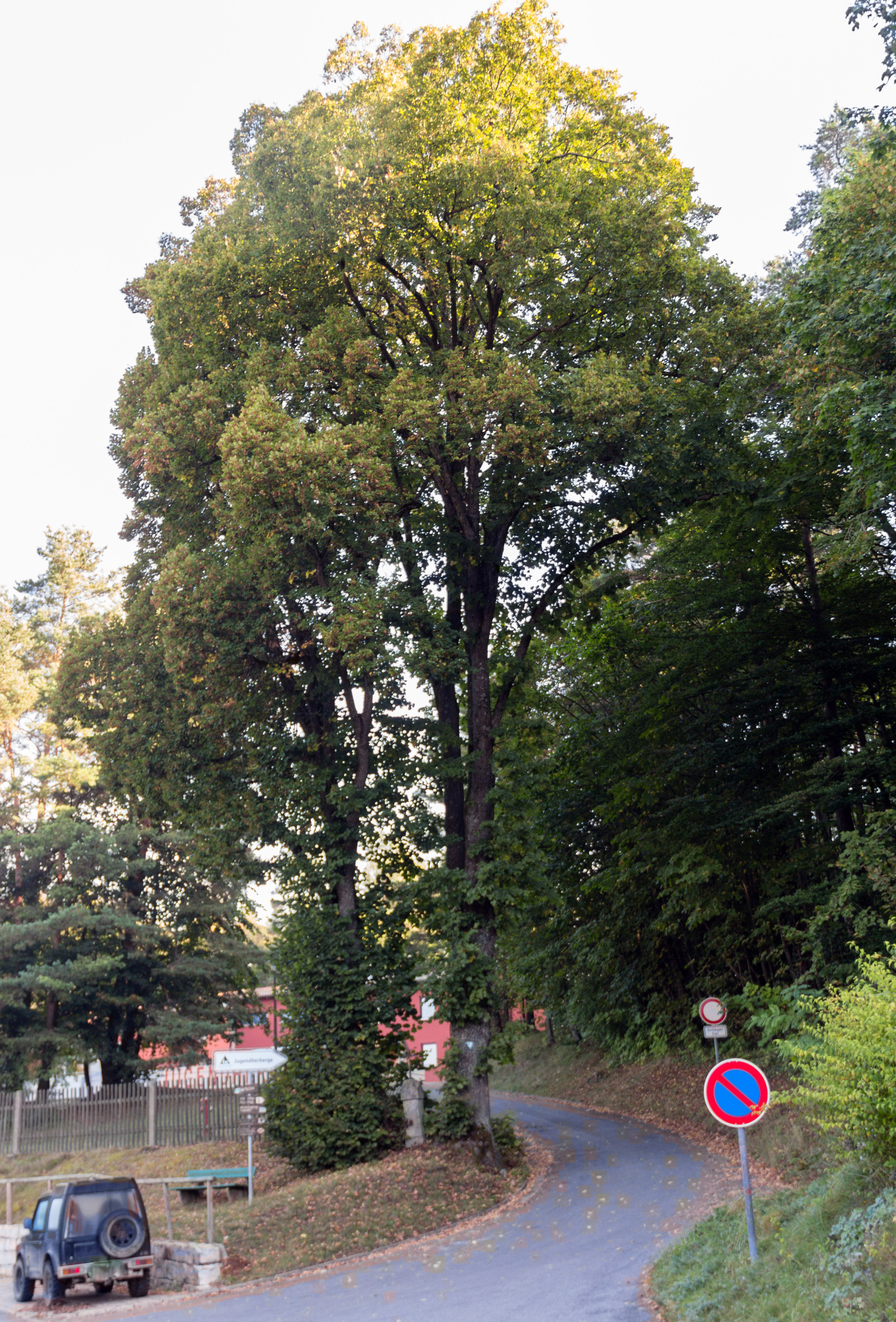 Linden bei der Jugendherberge in Hartenstein, Ehemaliges Naturdenkmal